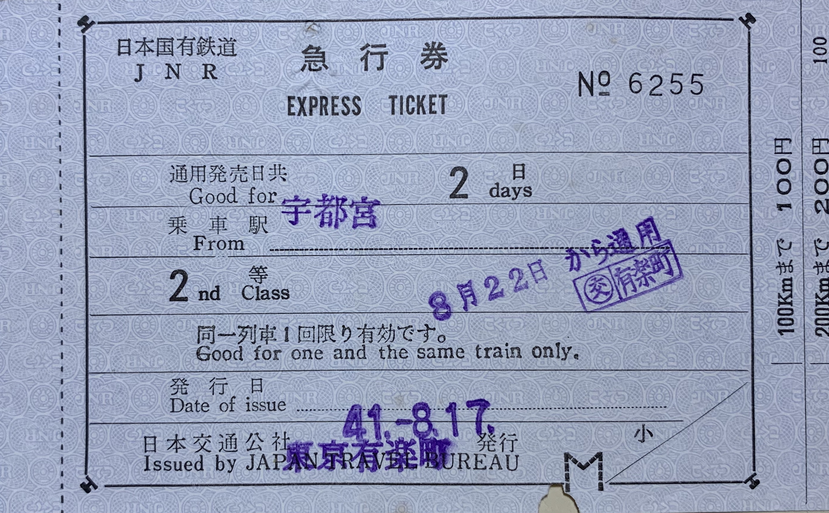 日本国有鉄道 急行券（1966年）